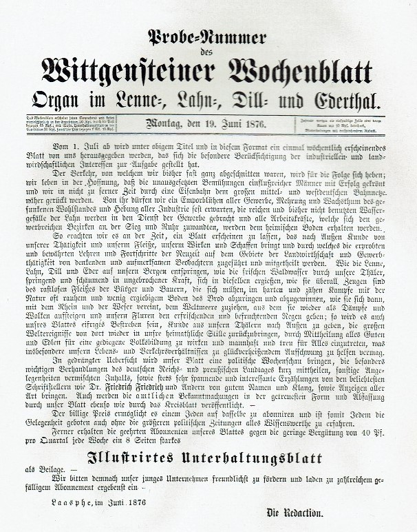 Nachdruck der Probe-Nummer vom 19. Juni 1876